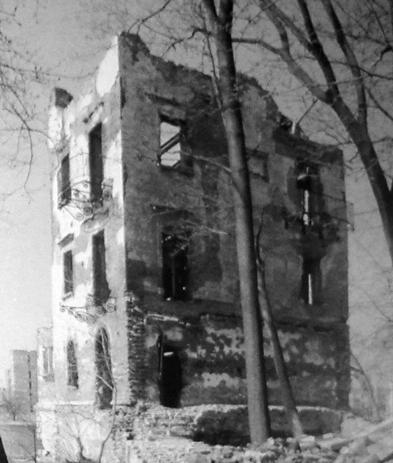 Ольгин павильон до раставрации